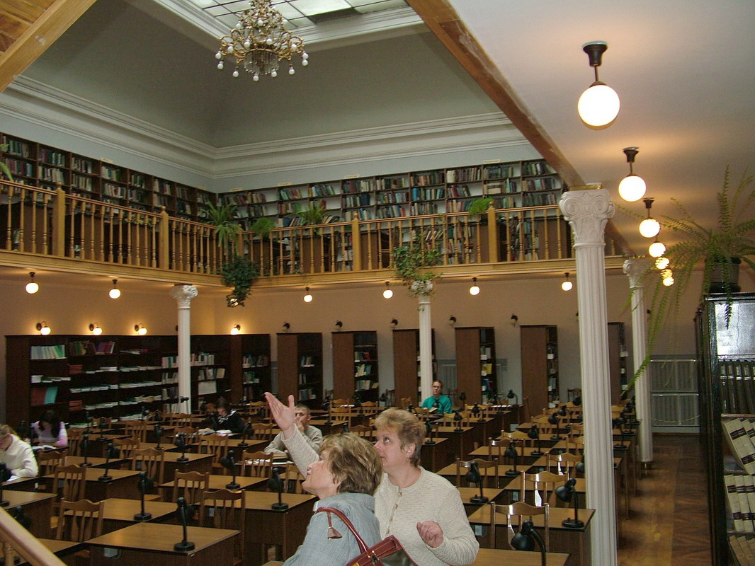 Lwów-czytelnia Ossolineum. Maj 2005.